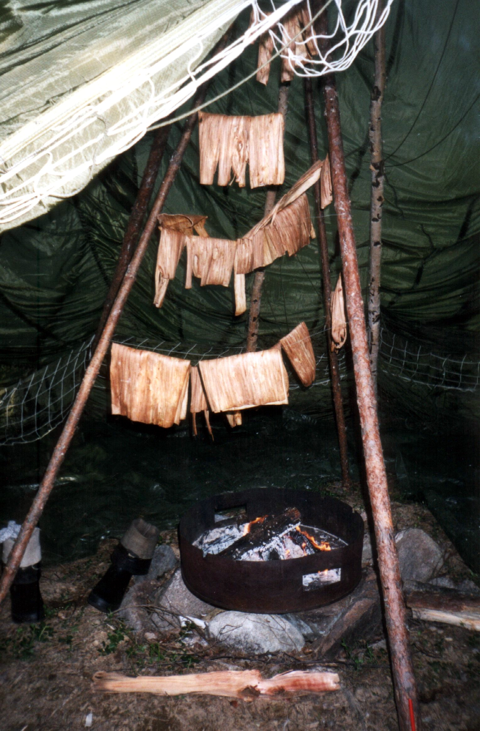 Torkning av innerbarken på tall, för att producera barkmjöl.